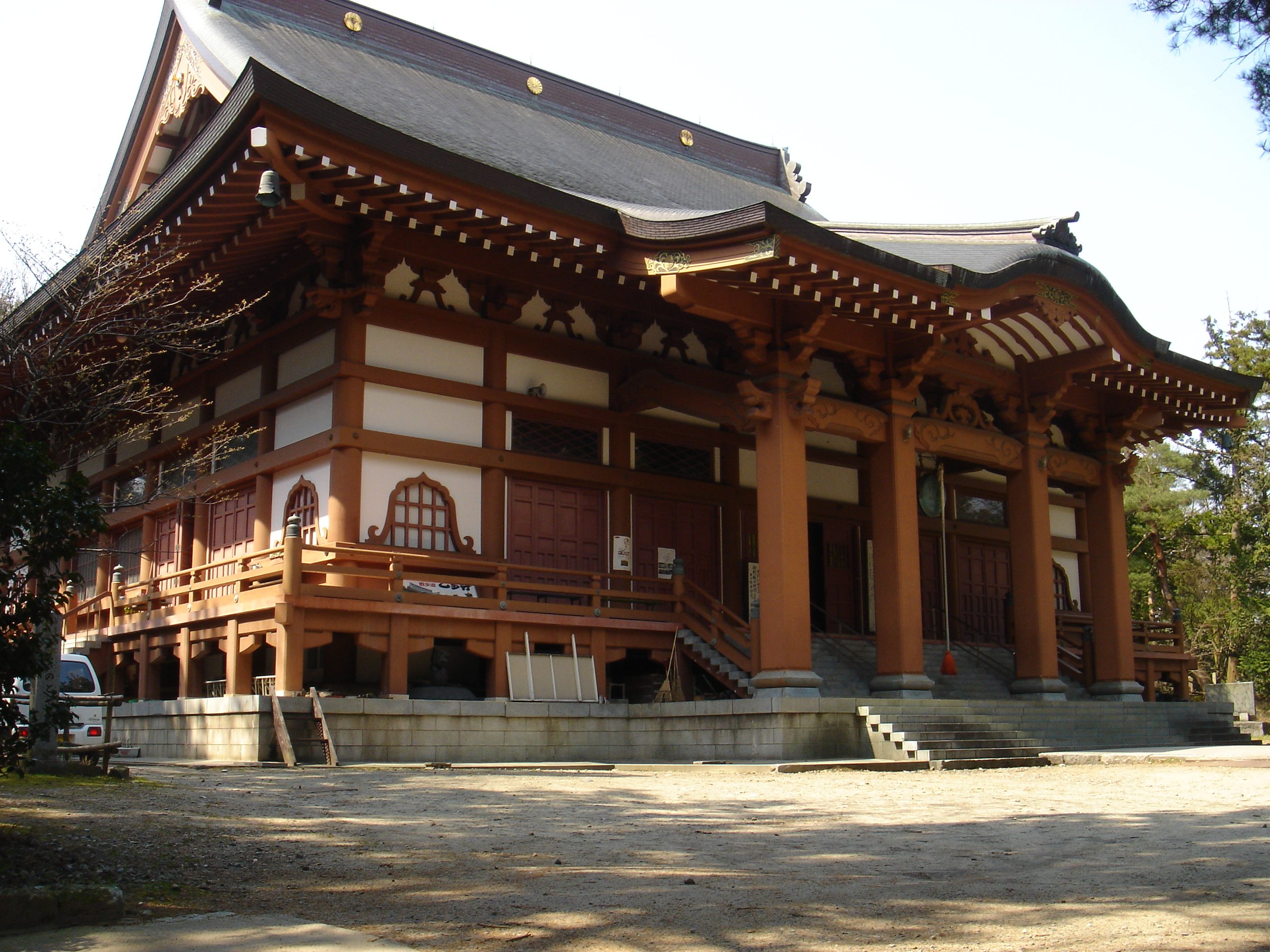 新潟県胎内市乙にある乙寶寺・大日堂